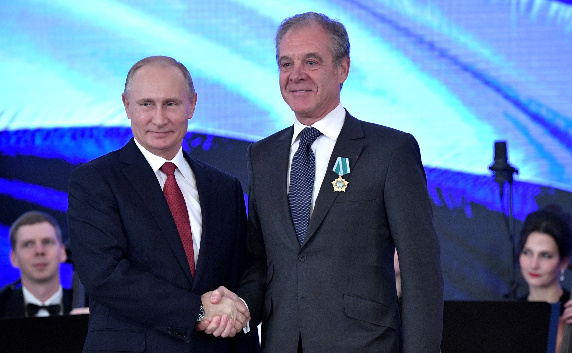 Орденом Дружбы награждён президент – генеральный директор компании «Сифаль» (Французская Республика) Жиль Реми